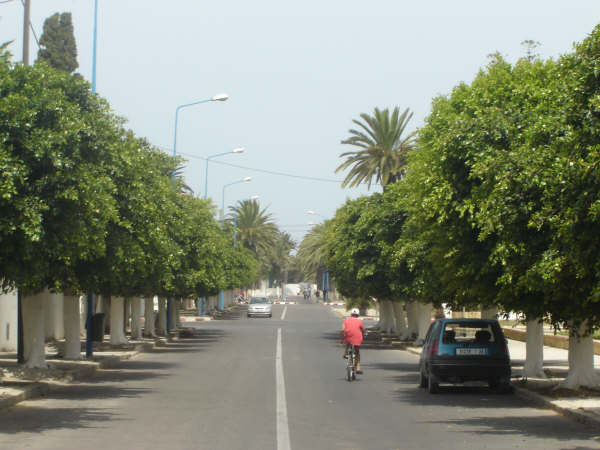 Safi et ses arbres